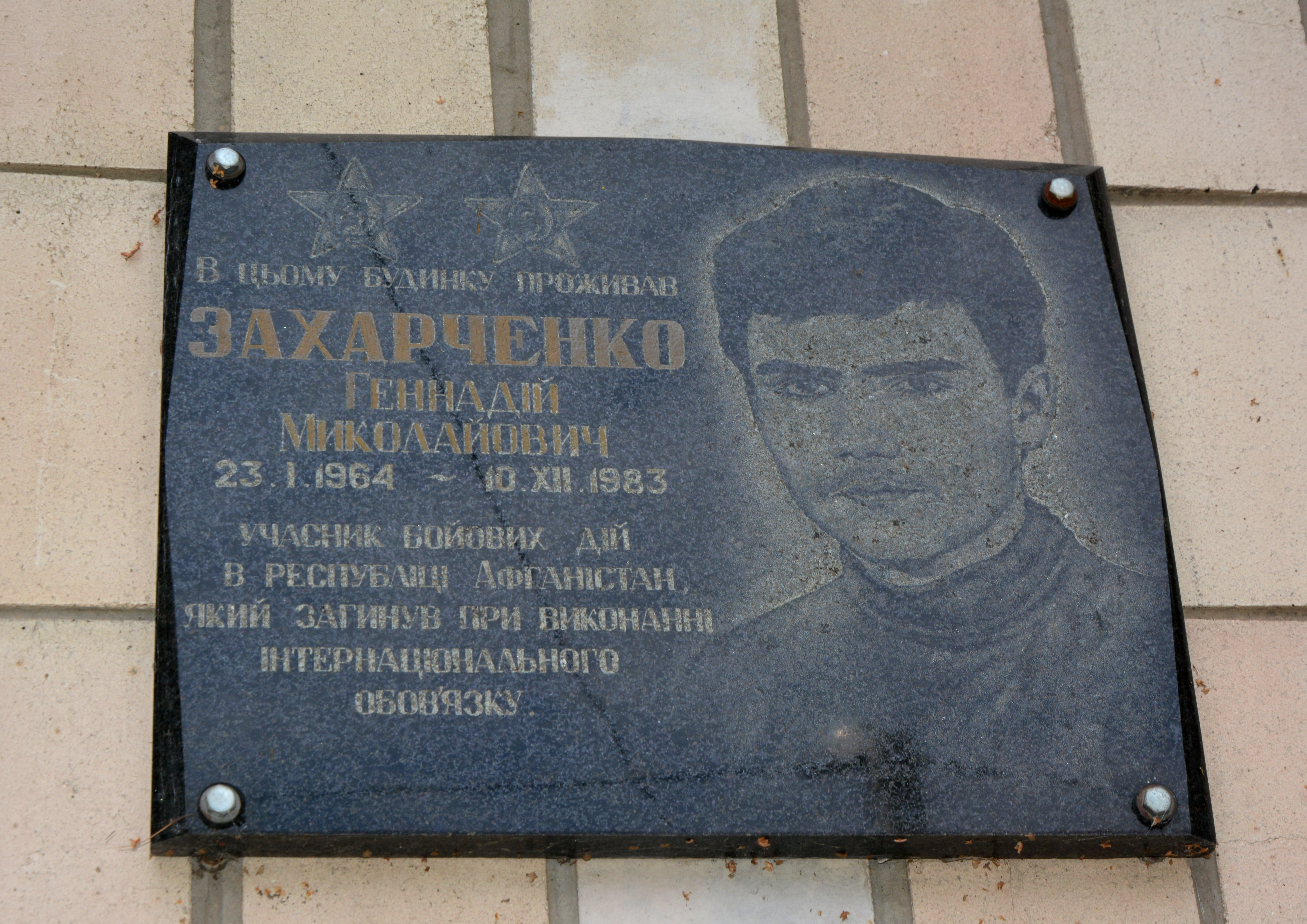 Меморіальна дошка на честь учасника бойових дій в Афганістані Г.М.Захарченка., Велика Багачка смт, Шевченка вул, 84.